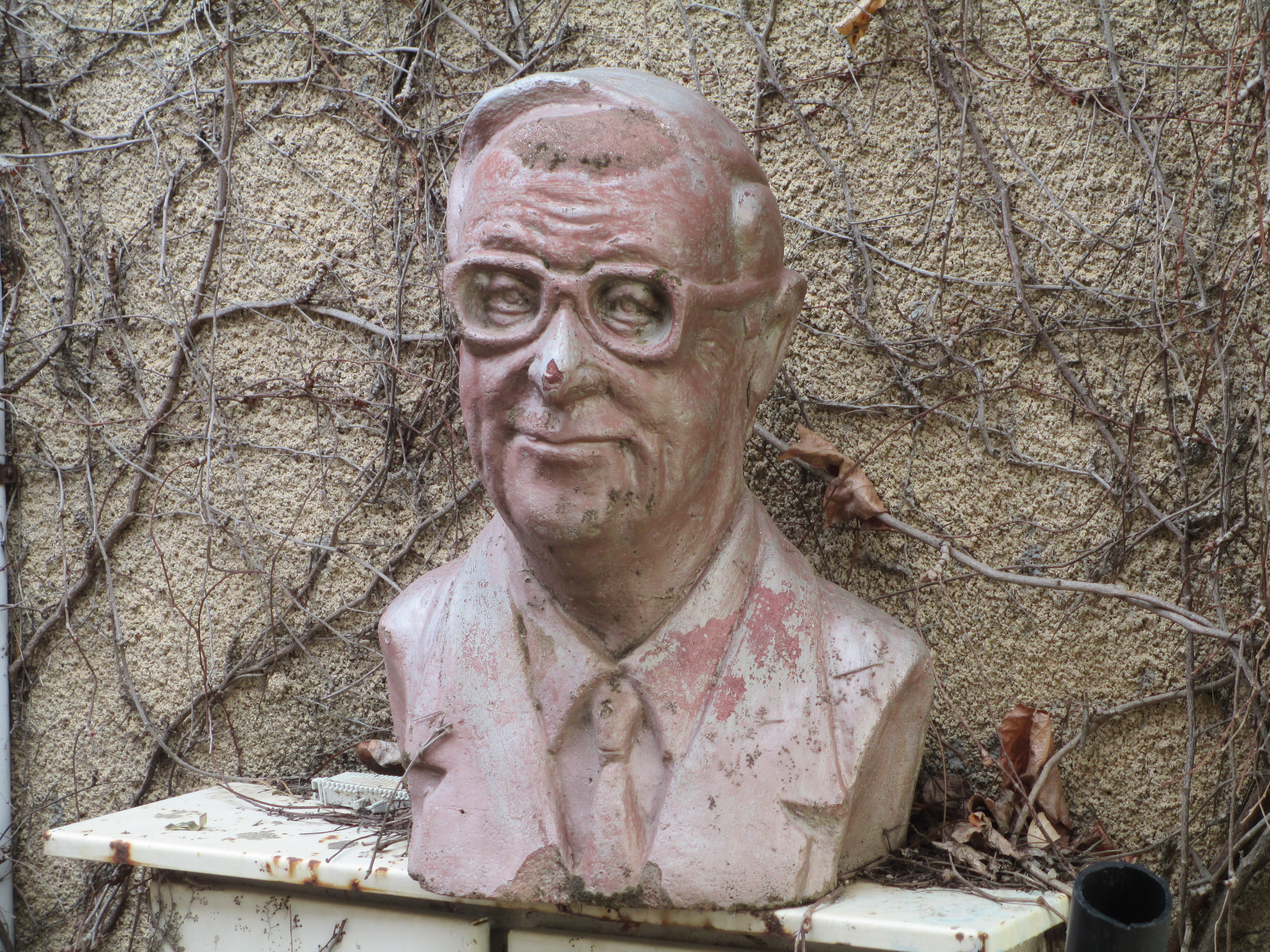 פסל של יצחק נבון בכפר בלום